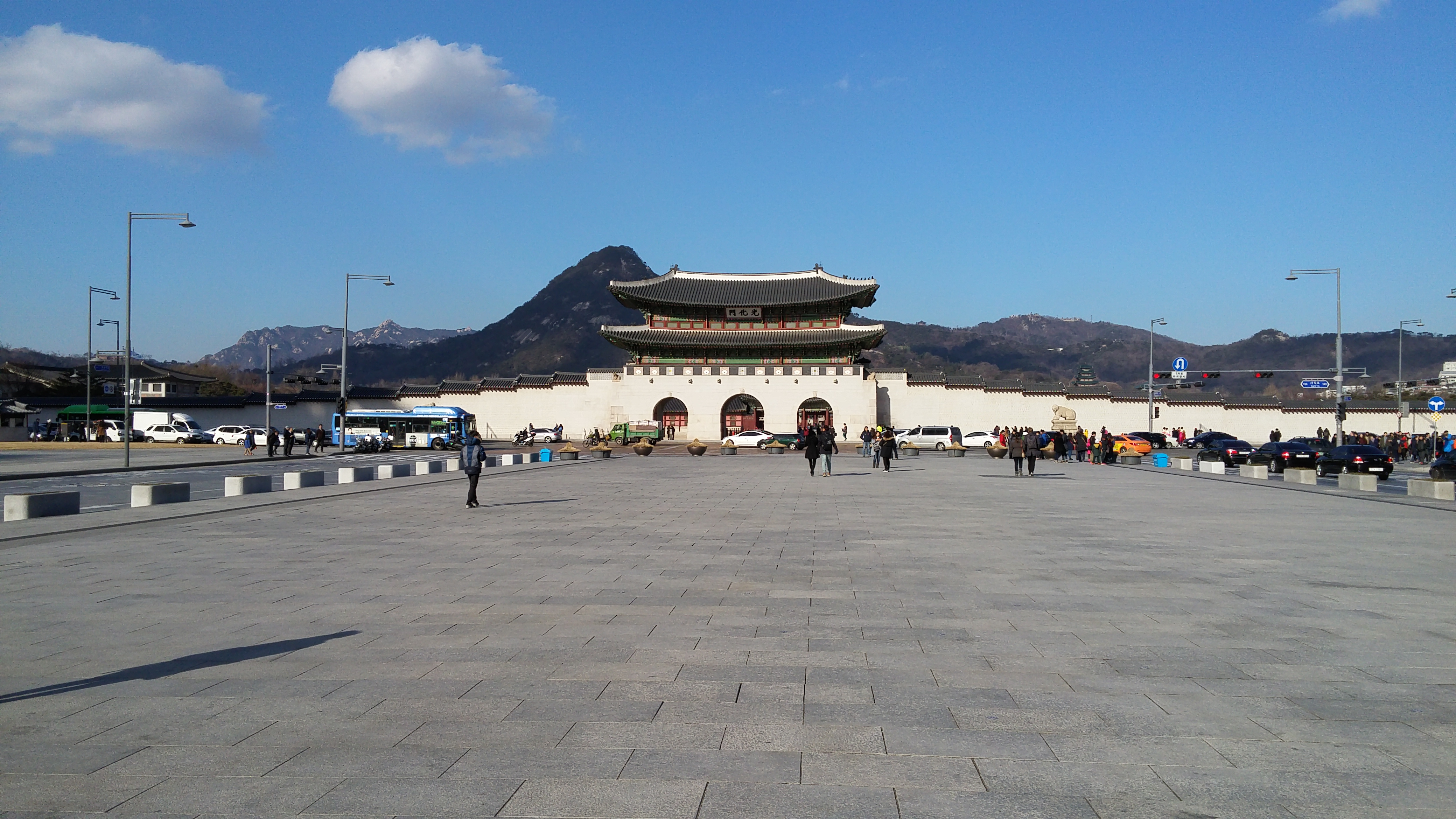 Das Tor Gwanghwamun vom Vorplatz.